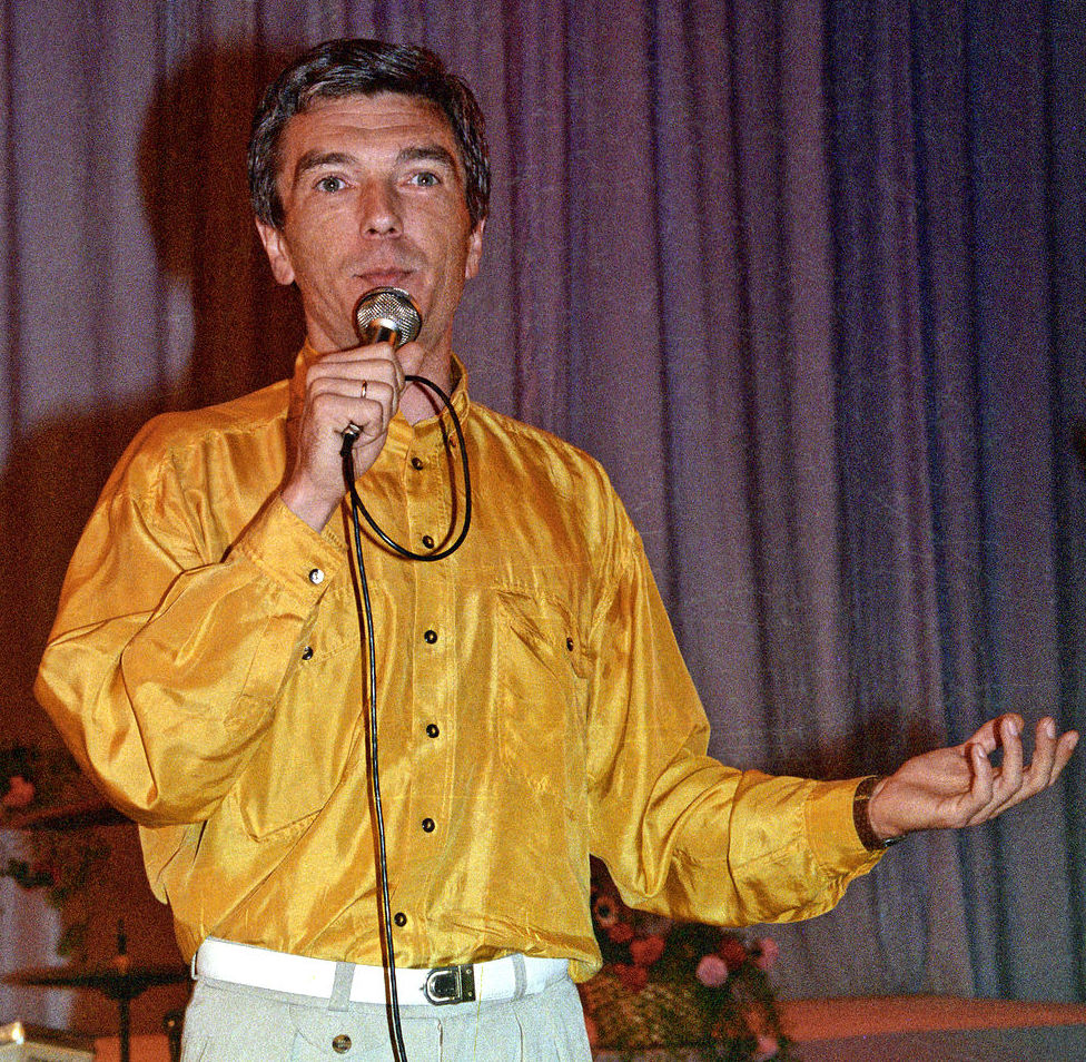 Юрий Александрович Николаев выступает в культурном центре «Славич» в день 60-летия ОАО «Компания Славич».